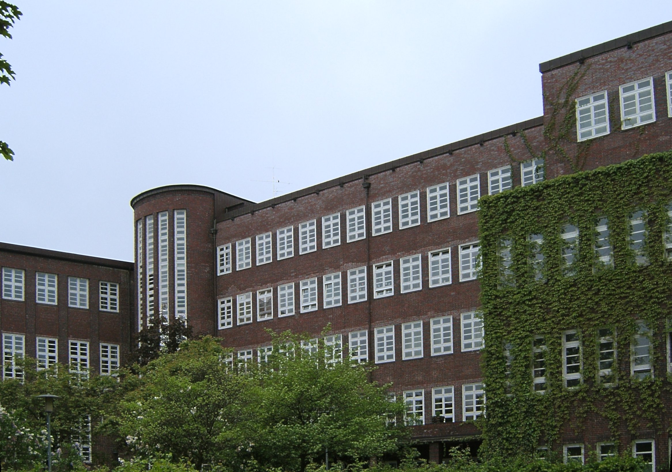 Die ehemalige Oberrealschule Caspar-Voght-Straße in Hamm-Nord wurde 1928/29 von Fritz Schumacher errichtet. Sie beherbergt heute die Ballettschule von John Neumeier. Im ehemaligen Gymnastiksaal befindet sich das Wandgemälde Orpheus mit den Tieren von Anita Rée. This is a photograph of an architectural monument.